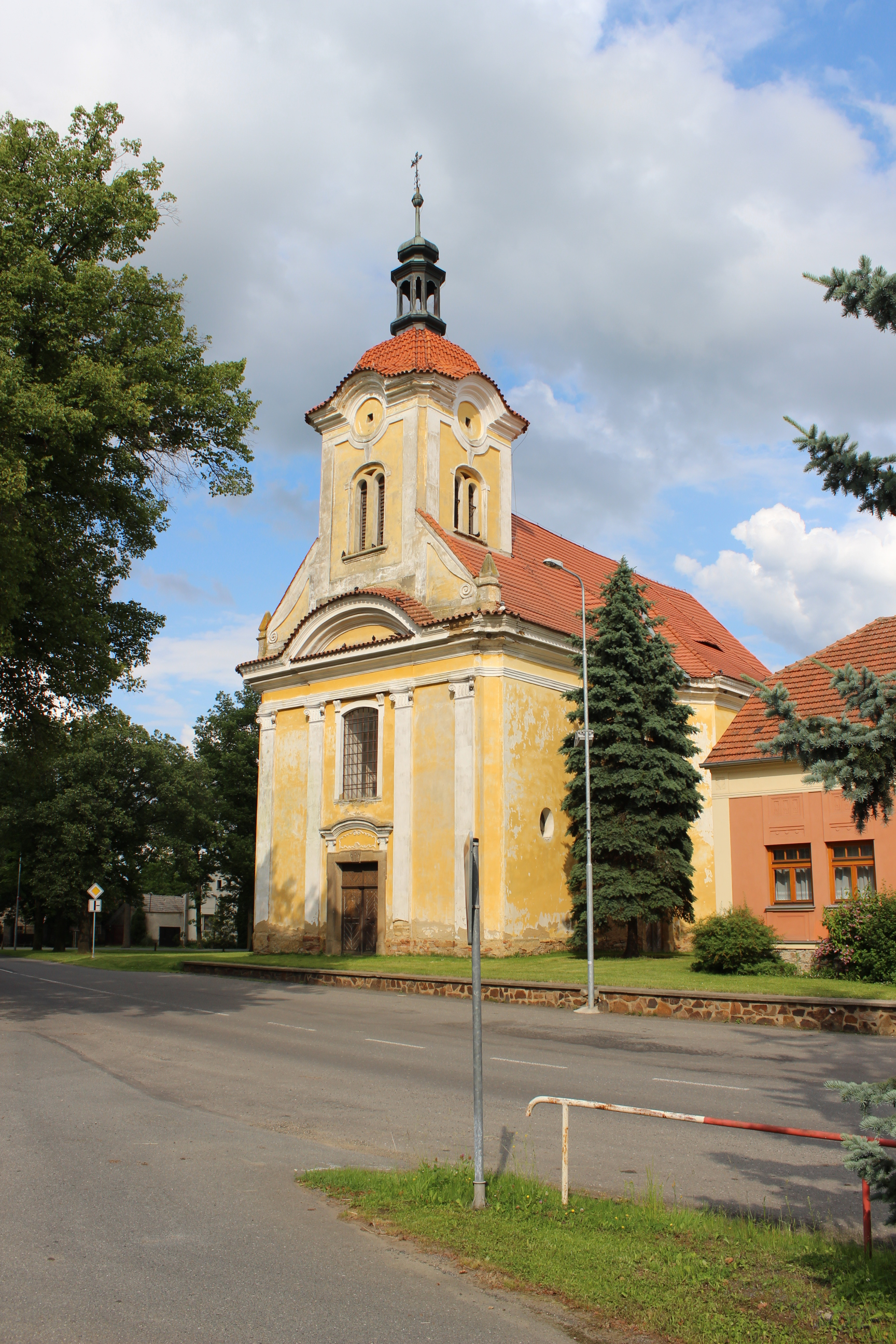 Kostel svaté Kateřiny v Pavlíkově.